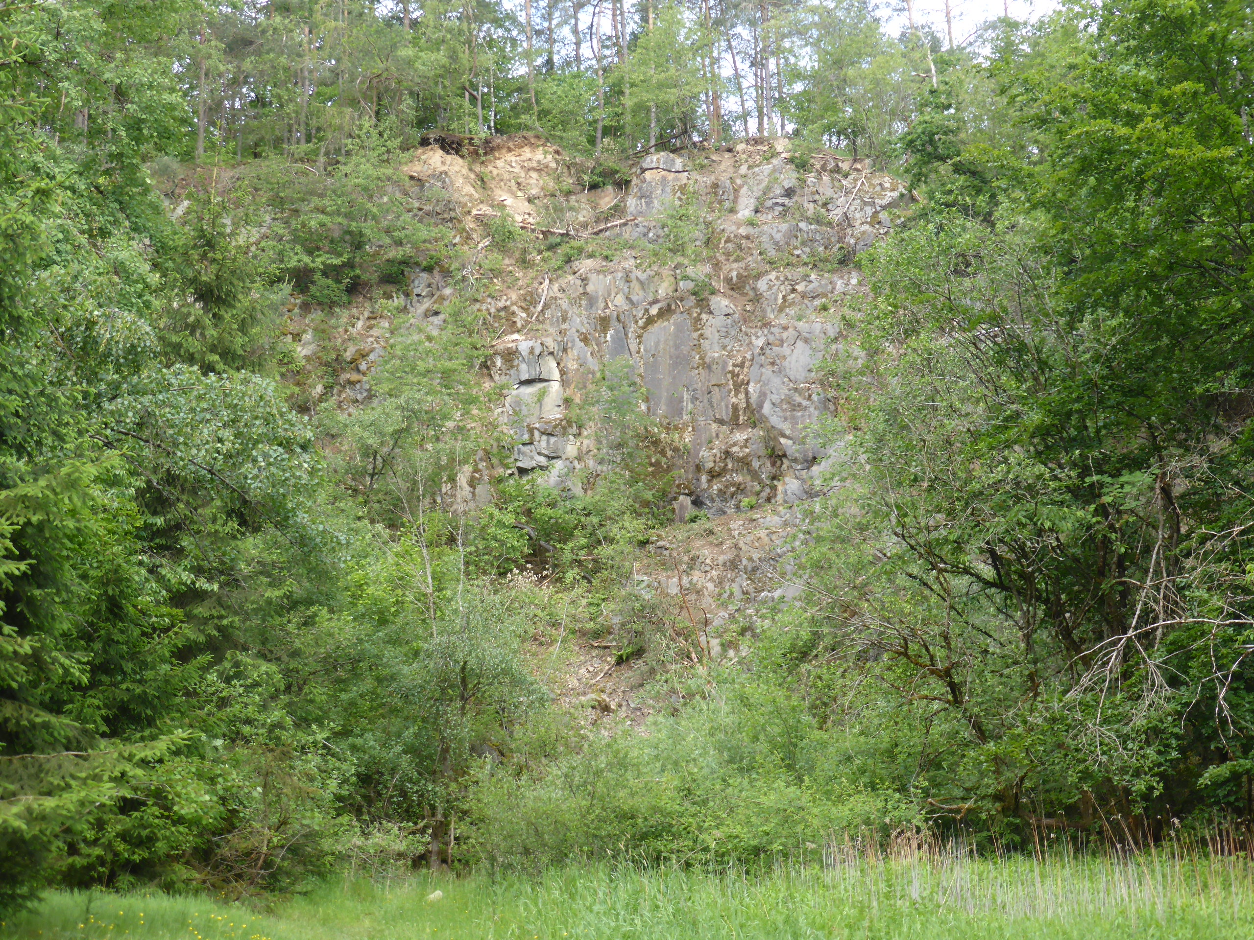 Ehemaliger Steinbruch am Kirchenberg, nördlich von Pilgramsberg im Landkreis Straubing-Bogen mit Infotafel. Gesteinsvorkommen: Granodiorit und Anatexit. Der Steinbruch gehört zur Liste der Geotope im Landkreis Straubing-Bogen.